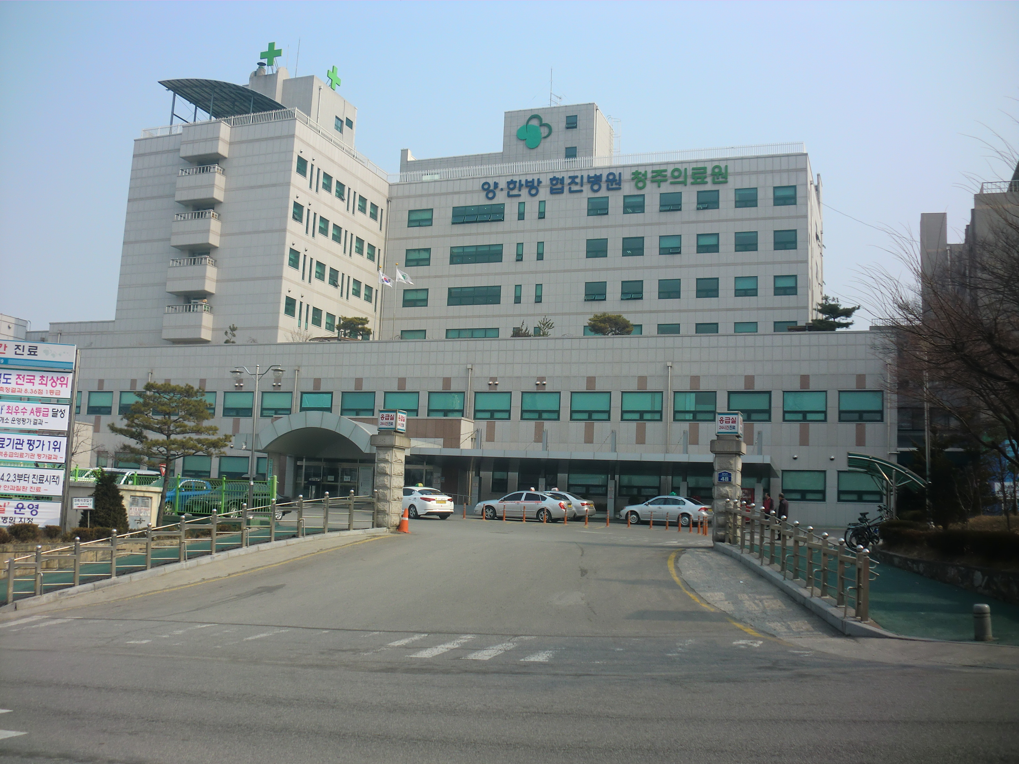 충청북도 청주시에 있는 청주의료원